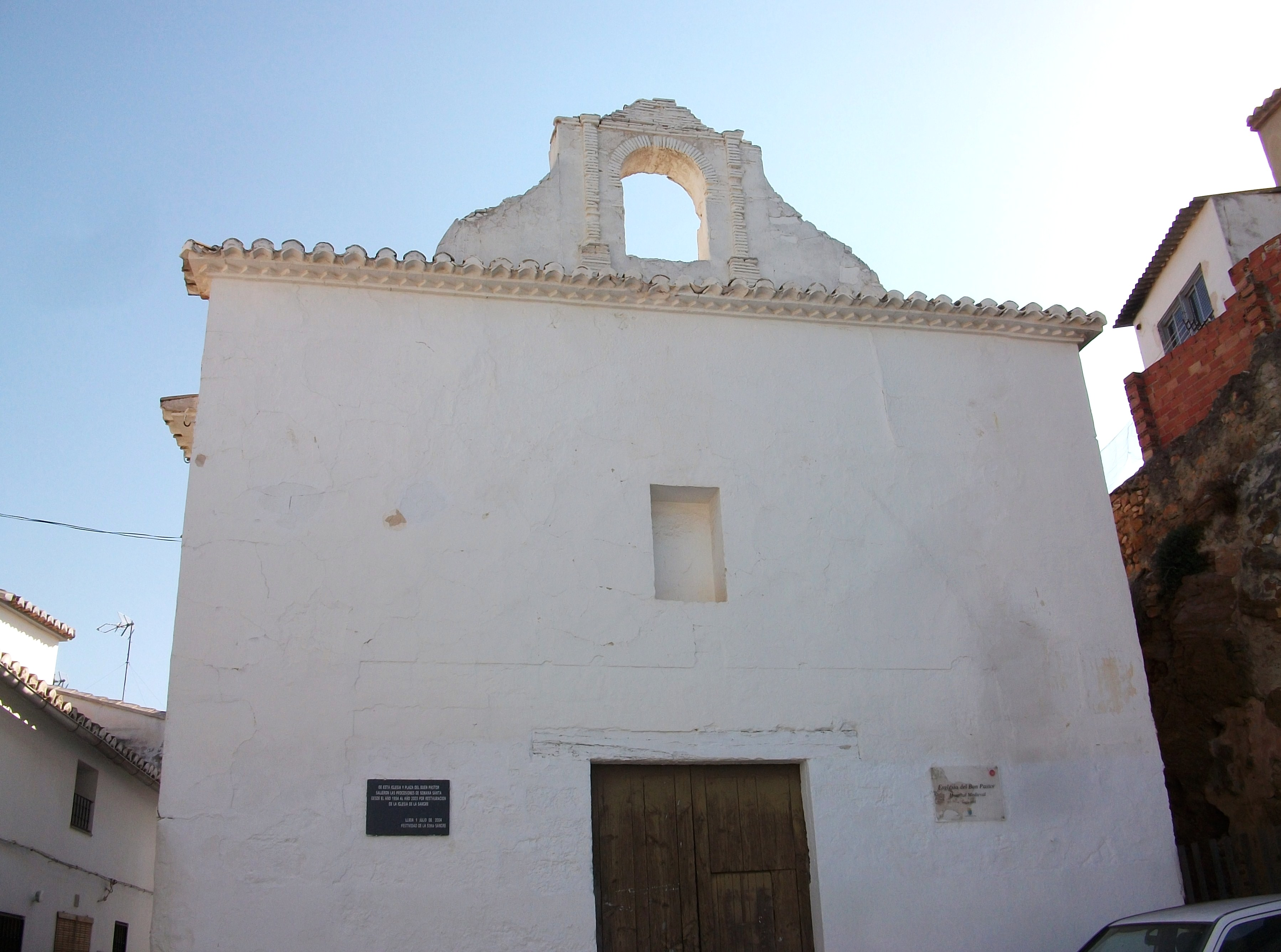 Església del Bon Pastor, segle XIII, Llíria. Edifici convertit en església aprofitant les restes d'una sala de l'antic hospital medieval. Té una estructura d'arcs diafragmàtics i posseeix les restes d'unes pintures murals italogòtiques del segle XIV que amb un dibuix expressiu representen el calvari i l'anunciació de Jesucrist.